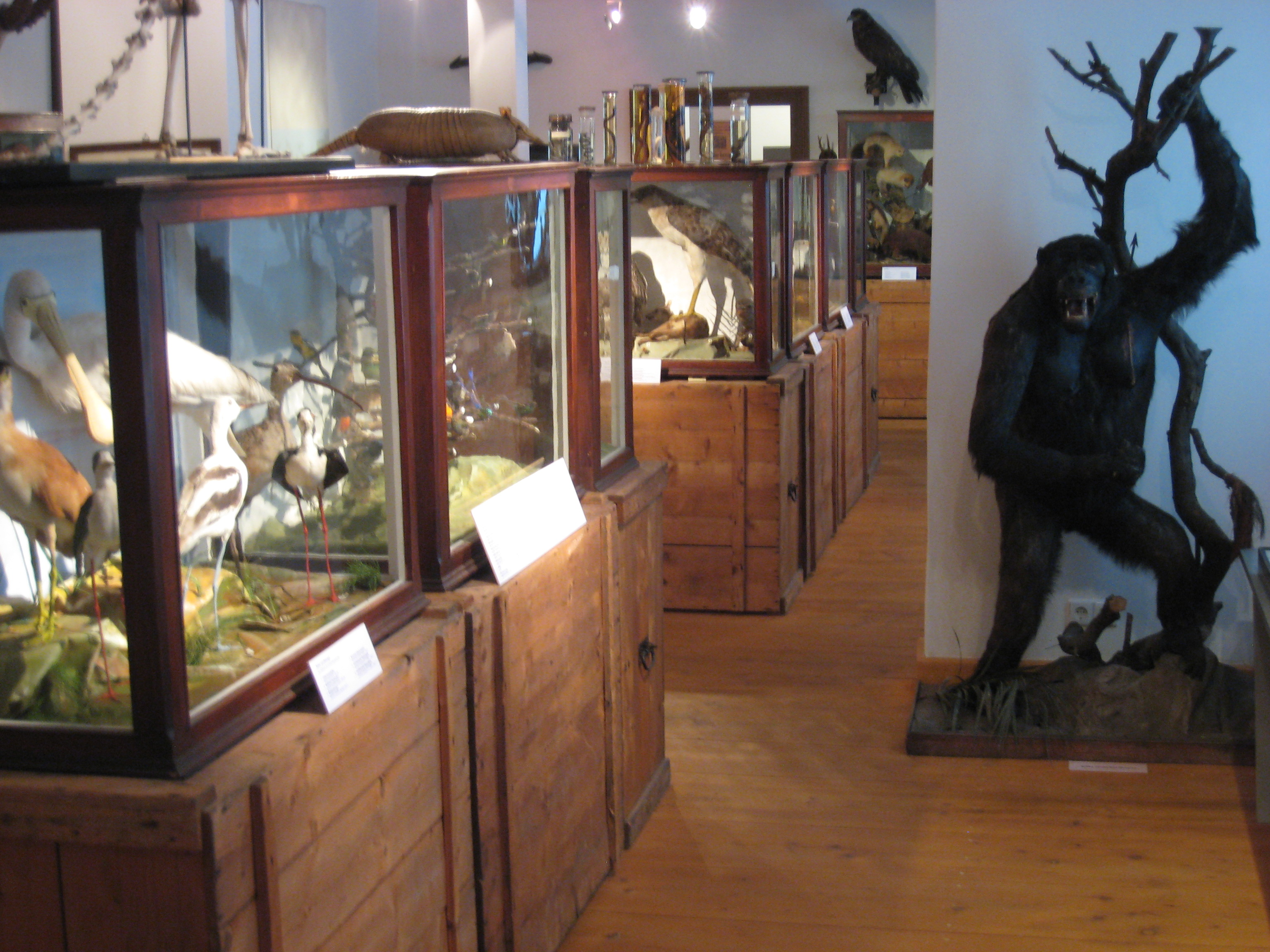 Einer von zwei Weiske gewidmeten Räumen im Stadtmuseum in Saalfeld